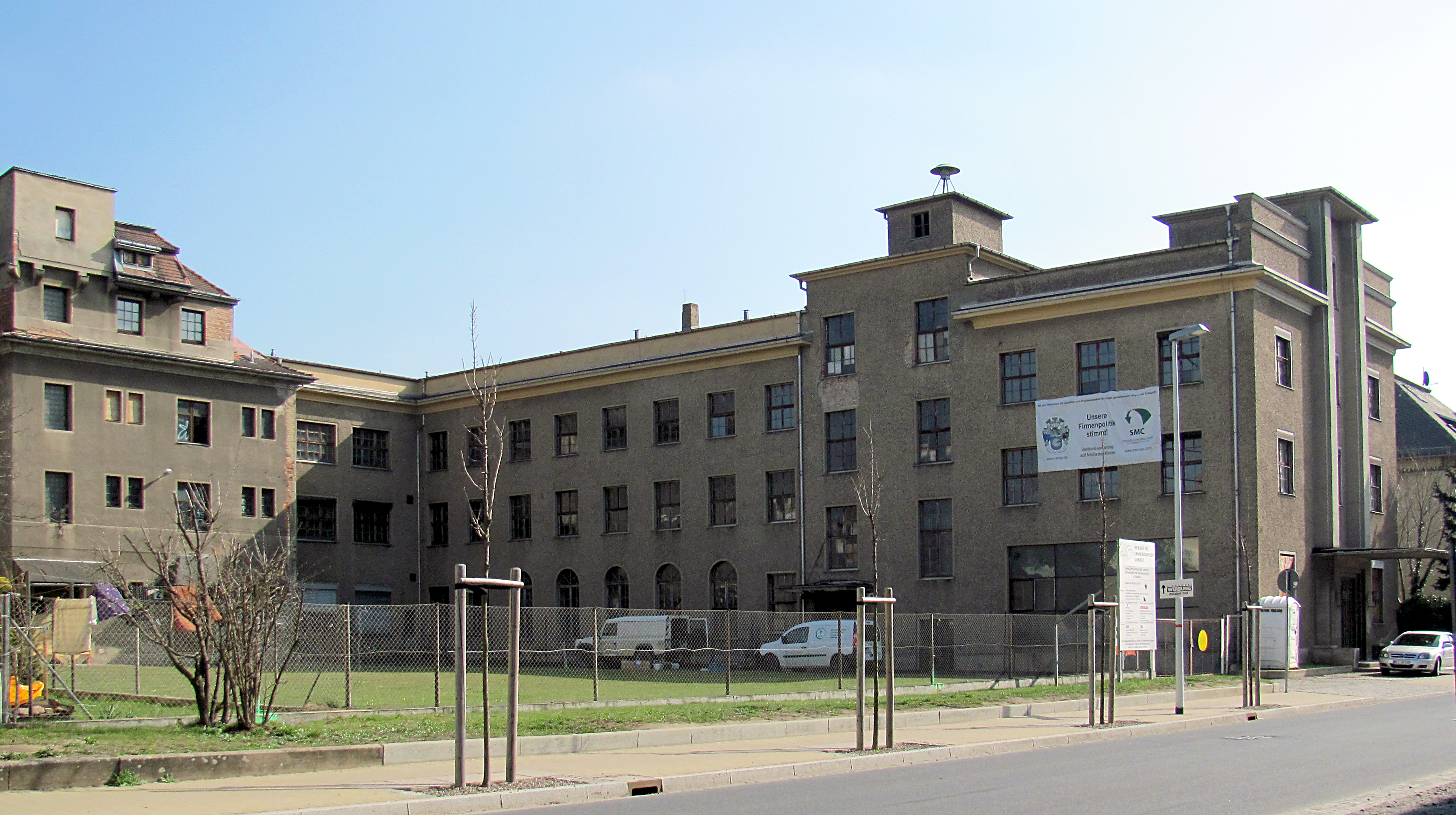 Radebeul, Industriegebäude Madaus